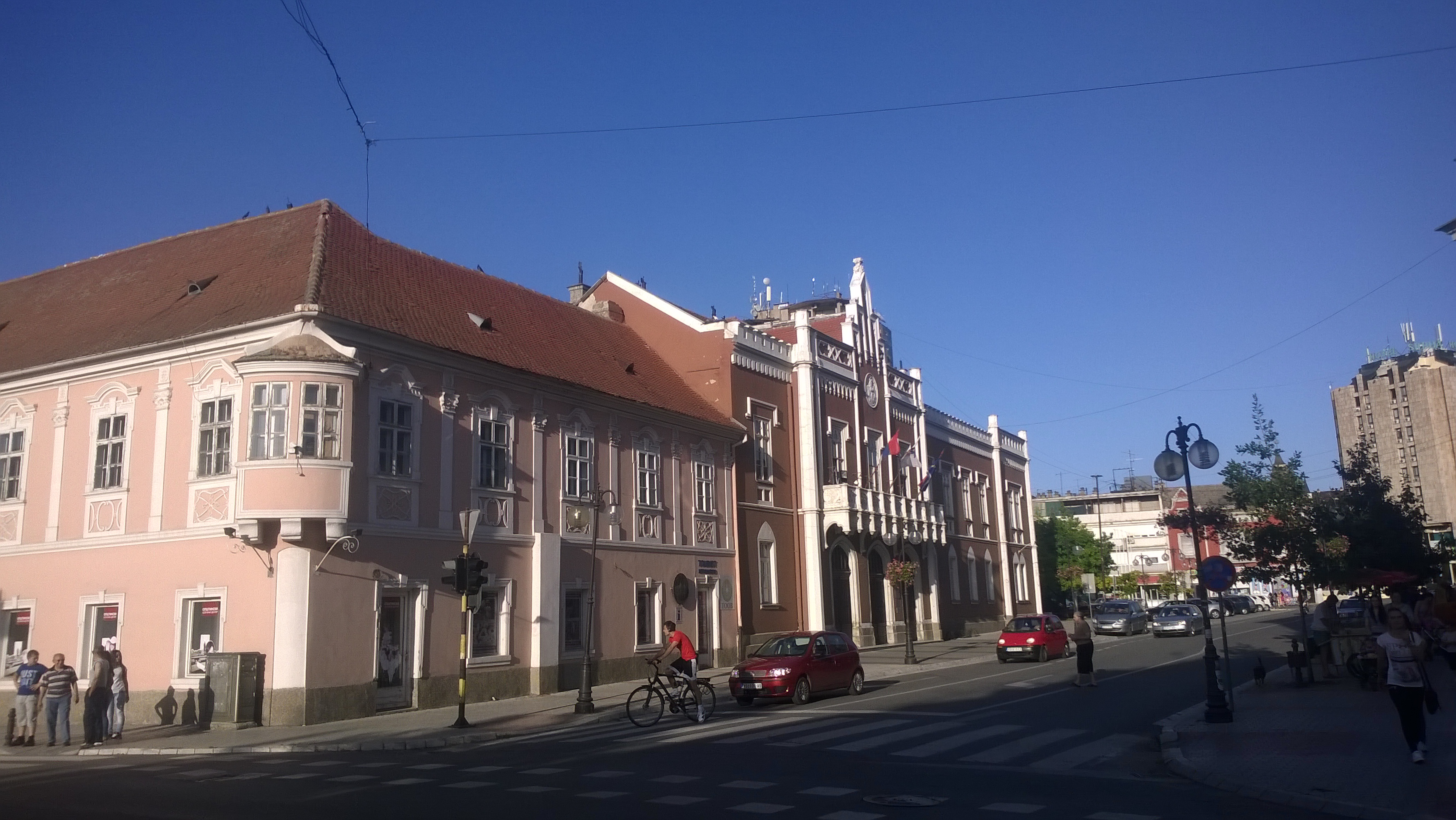 Центар, Вршац, Serbia